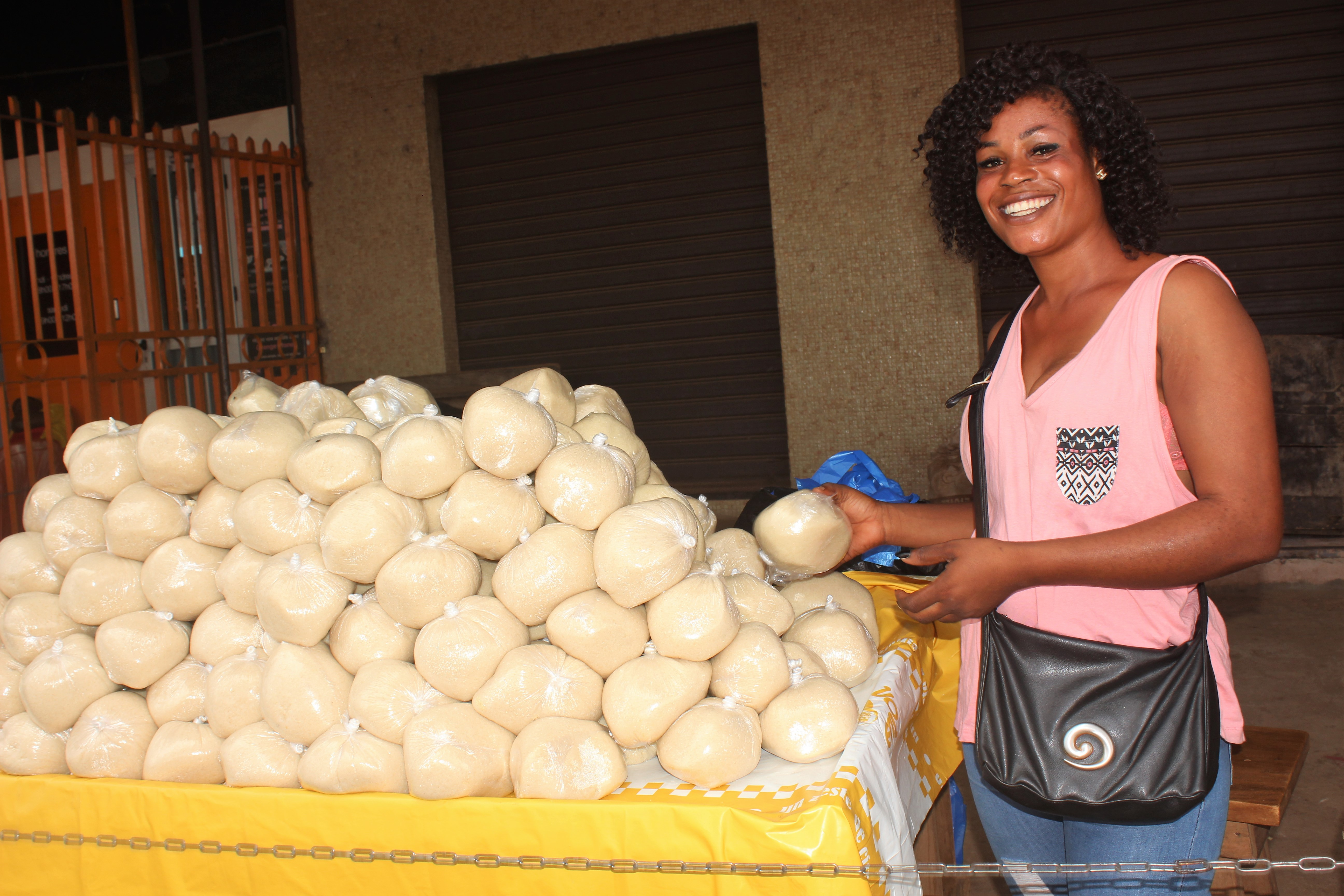 Venedeuse d'attiéké dans la ville de Dabou cote d'ivoire This is an image of "African people at work" from Ivory Coast